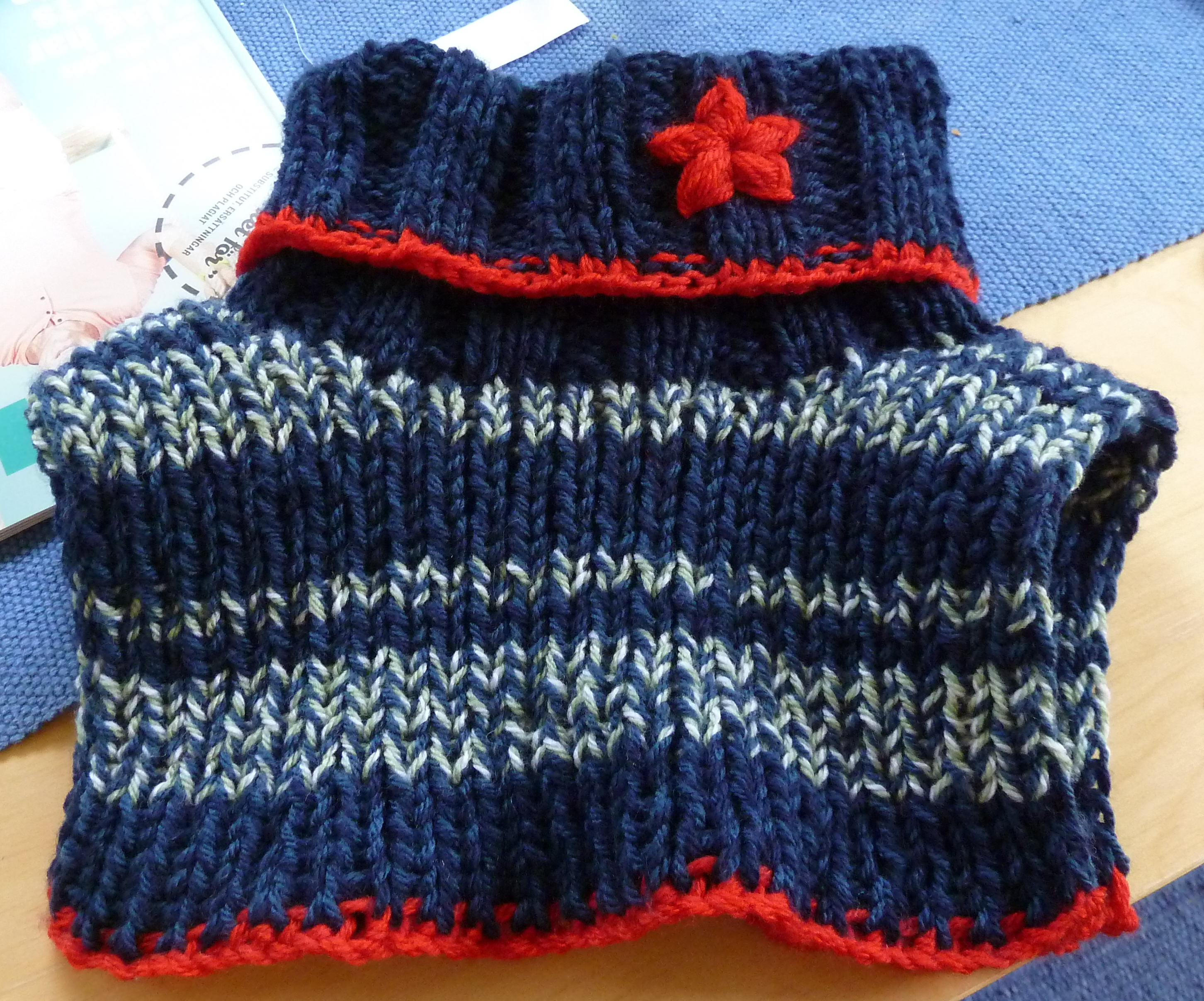 Stickad fuskolleKirundi: A cheater is a loose, often knitted, collar for use in winter.